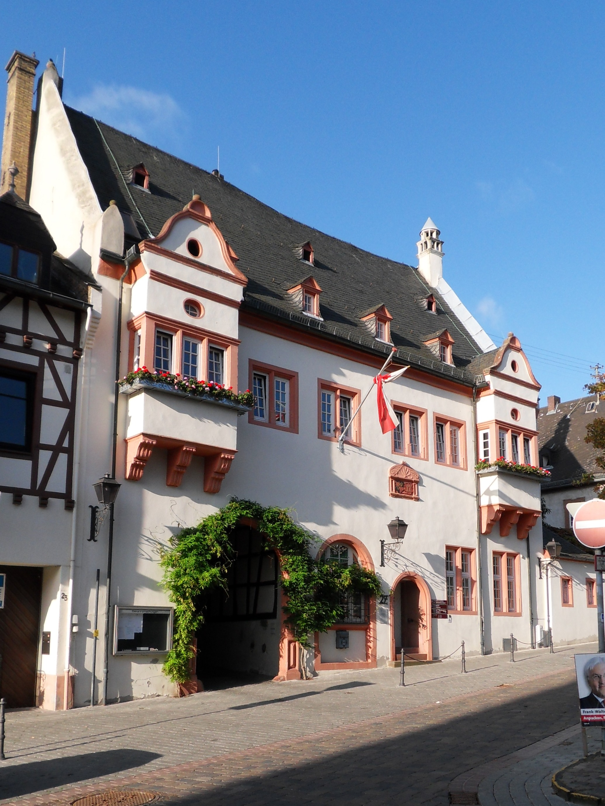 Das Renaissance-Rathaus am Marktplatz in Kiedrich ist die Zentrale der Gemeindeverwaltung und Amtssitz des Bürgermeisters